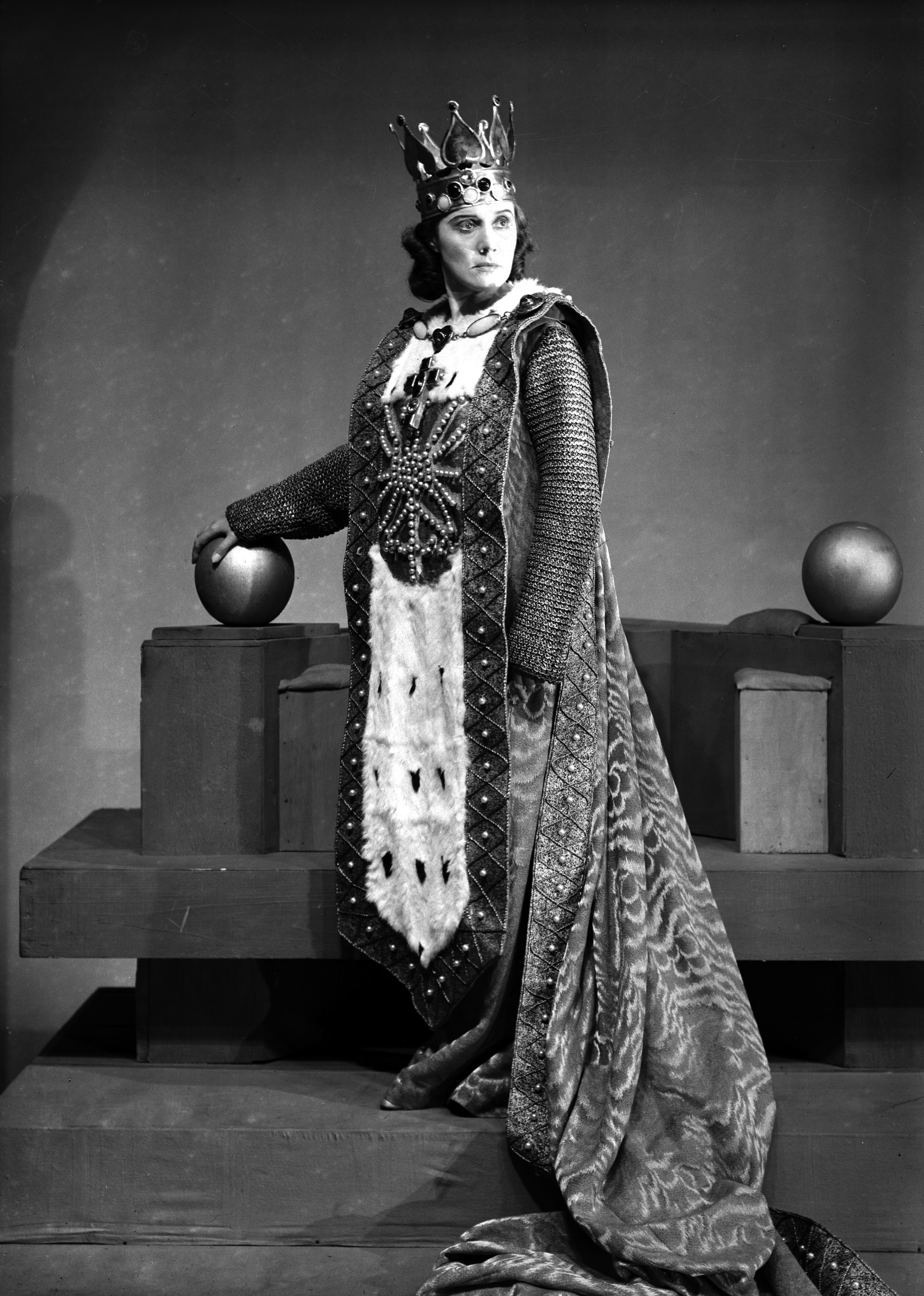 Przedstawienie "Balladyna" w Teatrze Miejskim im. Juliusza Słowackiego w Krakowie. Zofia Jaroszewska jako Balladyna w jednej ze scen